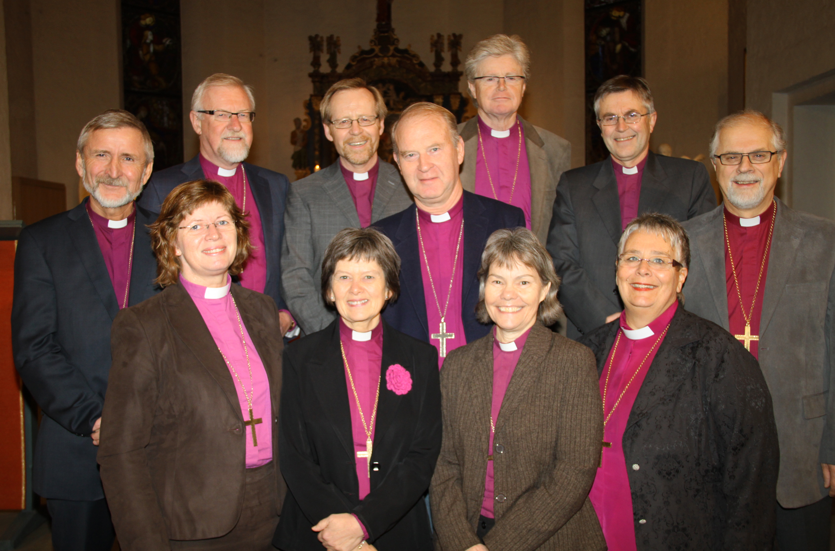 Den Norske kirkes biskoper anno November 2009. Foran fra venstre: Ingeborg Synøve Midttømme, Helga Haugland Byfuglien, Laila Riksaasen Dahl og Solveig Fiske. Bak fra venstre: Erling Pettersen, Ole Christian Mælen Kvarme, Halvor Nordhaug, Olav Skjevesland, Tor Berger Jørgensen, Tor Singsaas og Per Oskar Kjølaas.